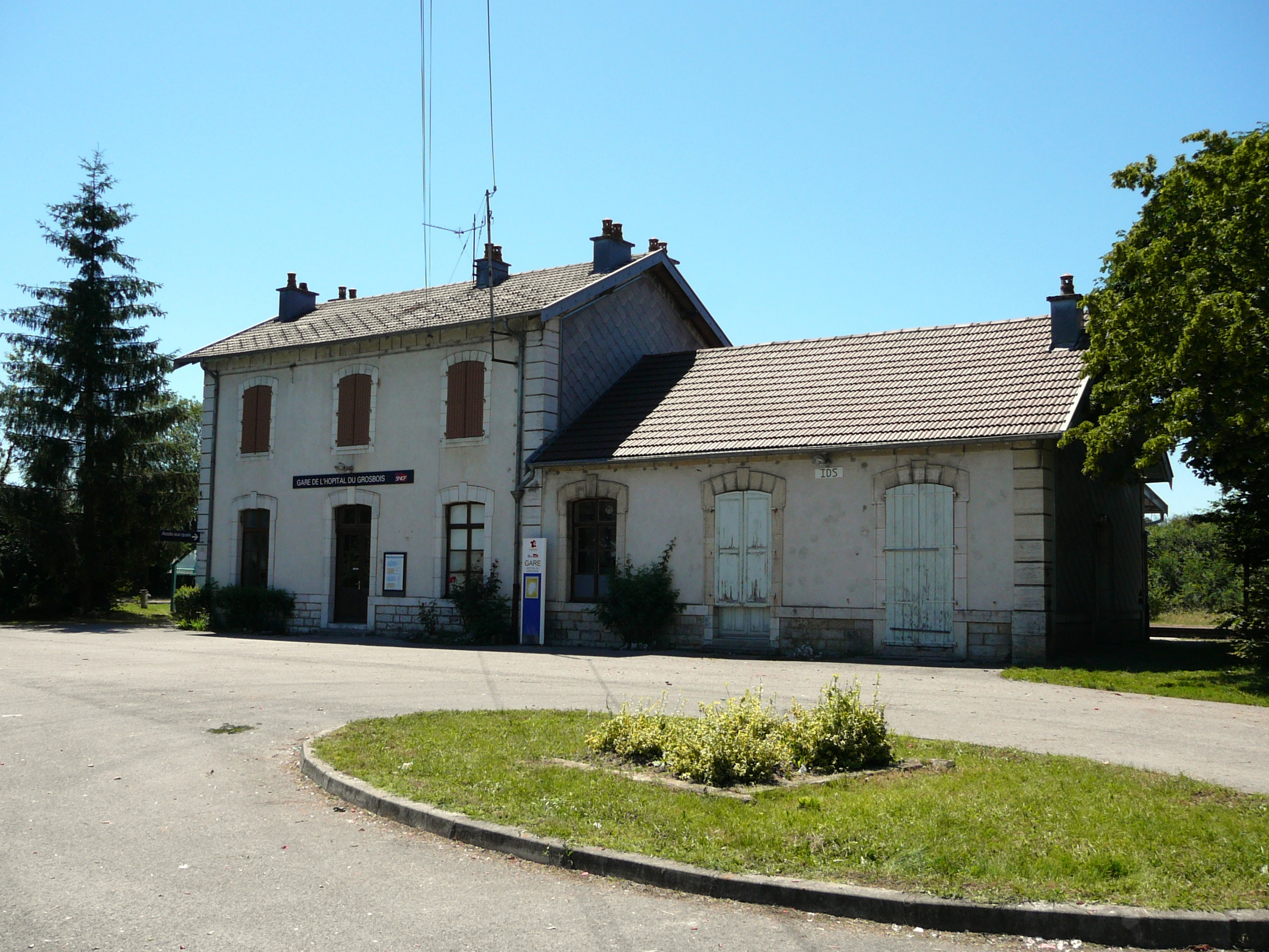 Gare de l'Hôpital du Grosbois